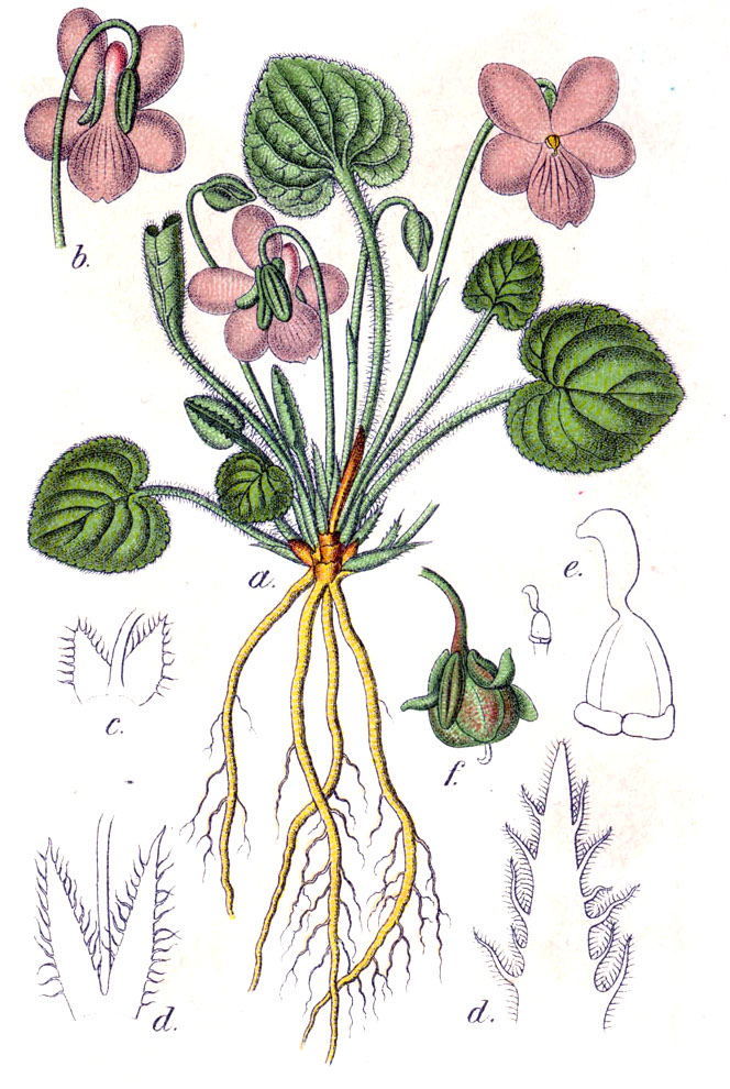 Viola collina Besser Original Caption Hügel-Veilchen, Viola collina